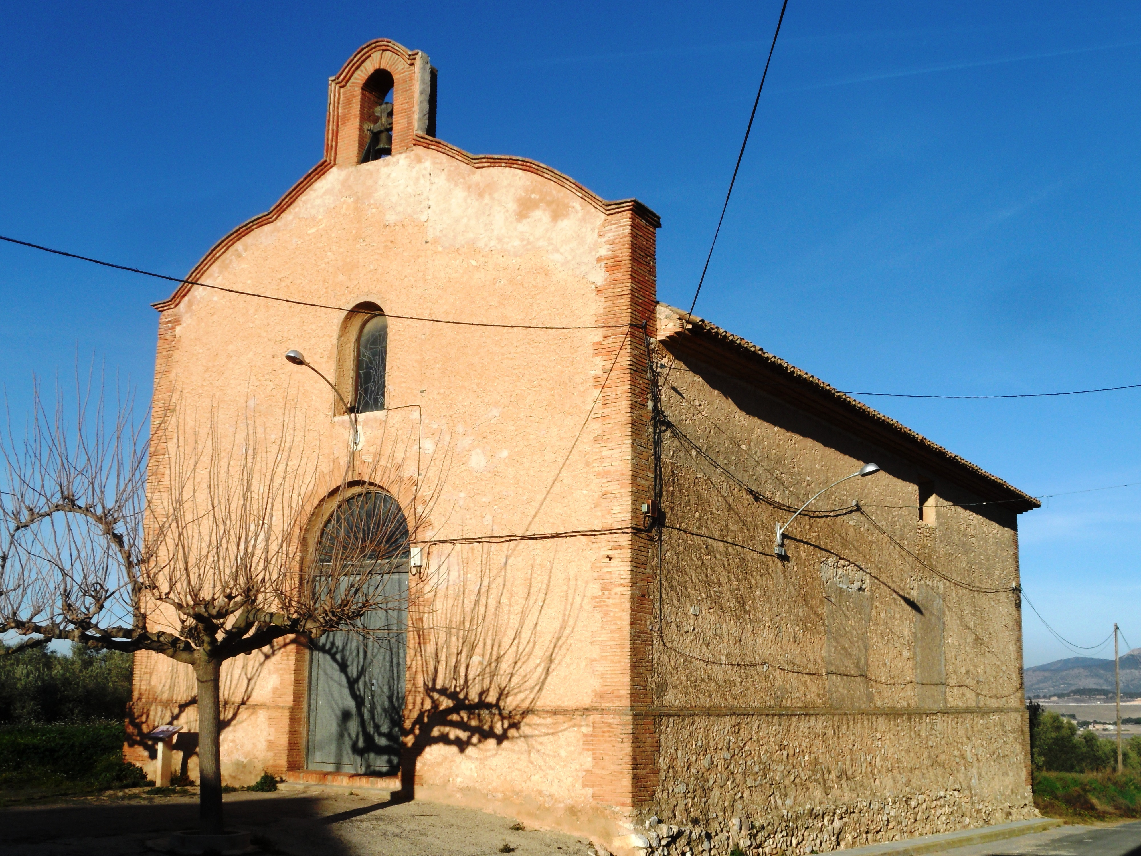 Ermita de Sant Isidre Llaurador de la Safra (Villena), segle XVIII.